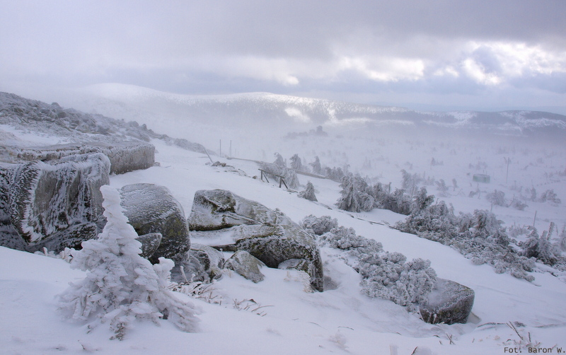 Widok ze Szrenicy na zachód.